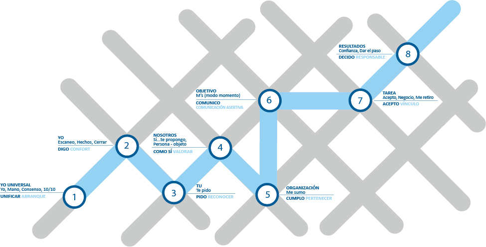 Proceso de team-building con instalación de herramientas por etapa del proceso: UNIFICAR: Alineación del equipo, reconocimiento de actitudes en apertura, equidad, respeto y compromiso. DIGO: Rompimiento de la zona de confort y paradigmas, reconocimiento de las diferencias en las necesidades, percepciones y expectativas. PIDO: Respeto a las diferencias y similitudes de cada persona, reconociendo emociones y miedos. COMO SÍ: Generar acuerdos y propuestas para encontrar soluciones, hacer que las cosas sucedan. CUMPLO: Sumar al equipo, enfocados al objetivo común con apertura. COMUNICO: Detonar la comunicación asertiva, responsabilizarse del resultado de sus conversaciones. Descubrir el sentido trascendente de su labor en la organización. ACEPTO: Capacidad de adaptación vs resistencia al cambio, compromiso con el equipo, manejo creativo de conflictos, establecer vínculos. DECIDO: Actuar en conciencia, de forma corresponsable de las decisiones, en sinergia haciendo que las cosas sucedan en un ambiente de Confianza.